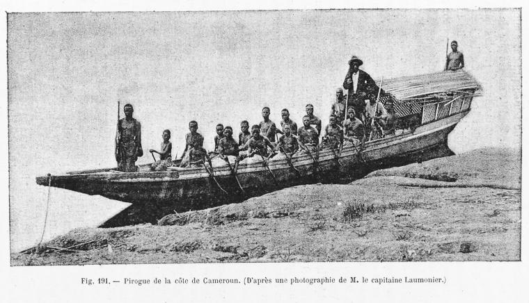 Pirogue de la côte de Cameroun. (D'après une photographie de M. le capitaine Laumonier.)